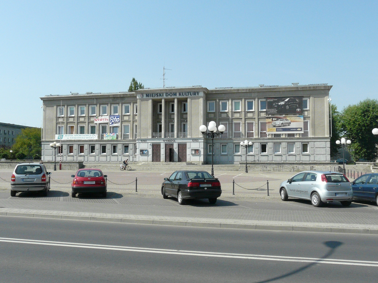 Miejski Dom Kultury w Stalowej Woli